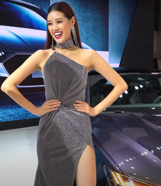 Khánh Vân, ảnh chụp màn hình từ video của Autodaily.vn (screen capture from video of Autodaily.vn).